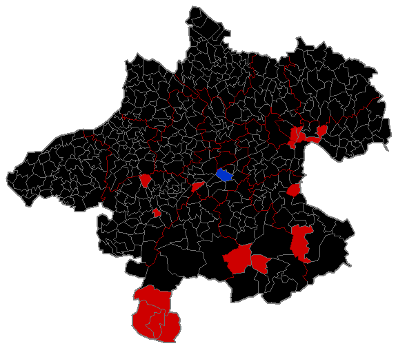 Oberösterreich-Karte nach stimmenstärkste Partei bei der Landtagswahl 2009 schwarz: ÖVP rot: SPÖ blau: FPÖ